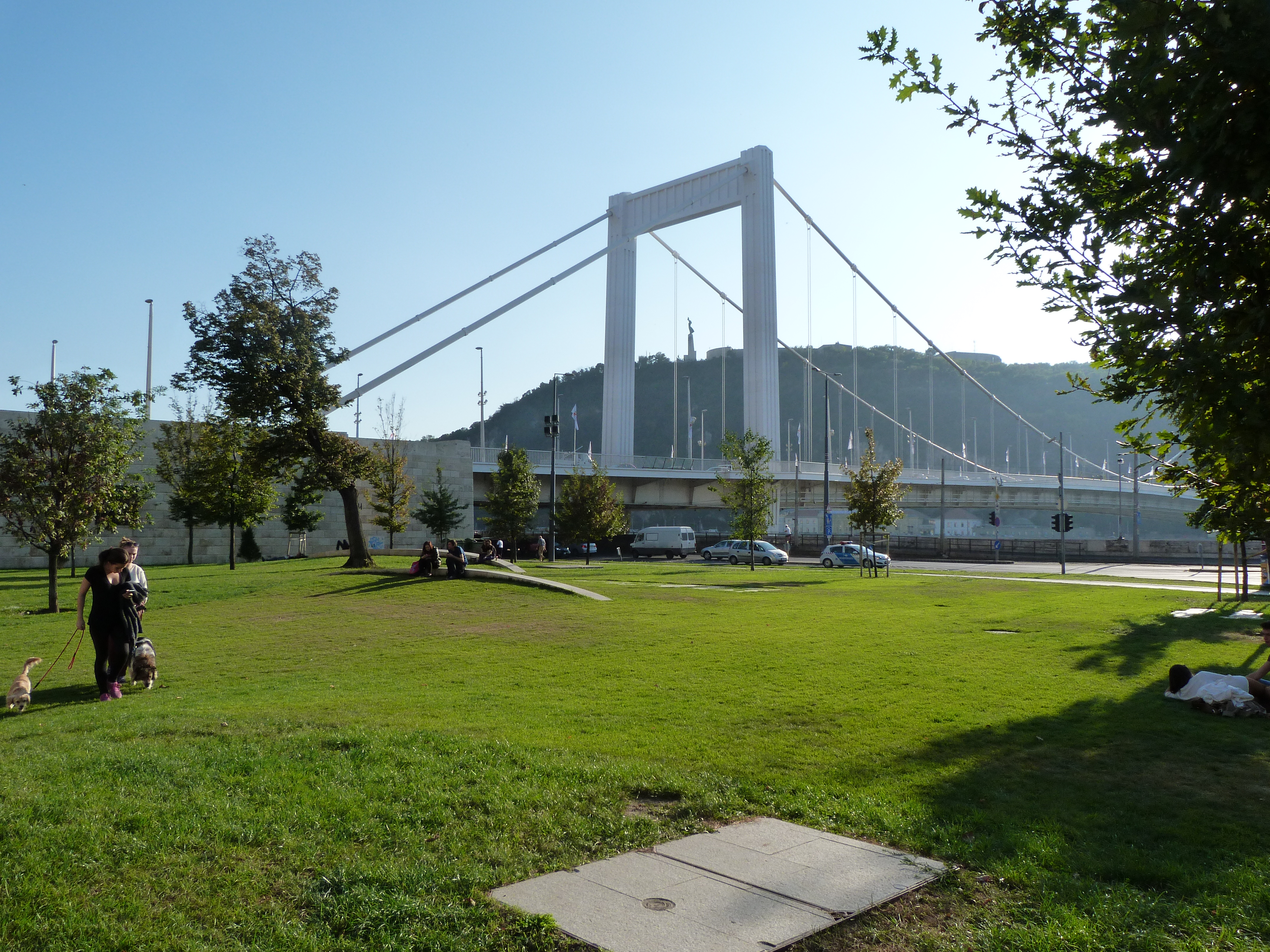 A felvétel 2014. október 10-én készült Budapesten, a Belvárosban. Petőfi tér. ©© Derzsi Elekes Andor, Budapest, 2014, A kép egészben, vagy részletekben másolását, bármilyen úton történő sokszorosítását és felhasználását a szerző ellenérték nélkül, jogutódjaira is kihatóan megengedi. Az engedély kiterjed a kereskedelmi célú hasznosításra is. Kéri azonban nevének feltüntetését a felhasználás során. A Metapolisz sorozat valamennyi képe és filmje Creative Commons alatti valamint kereskedelmi - for profit - célra is felhasználható. Ajánlott hivatkozás: Derzsi Elekes Andor: Metapolisz DVD line